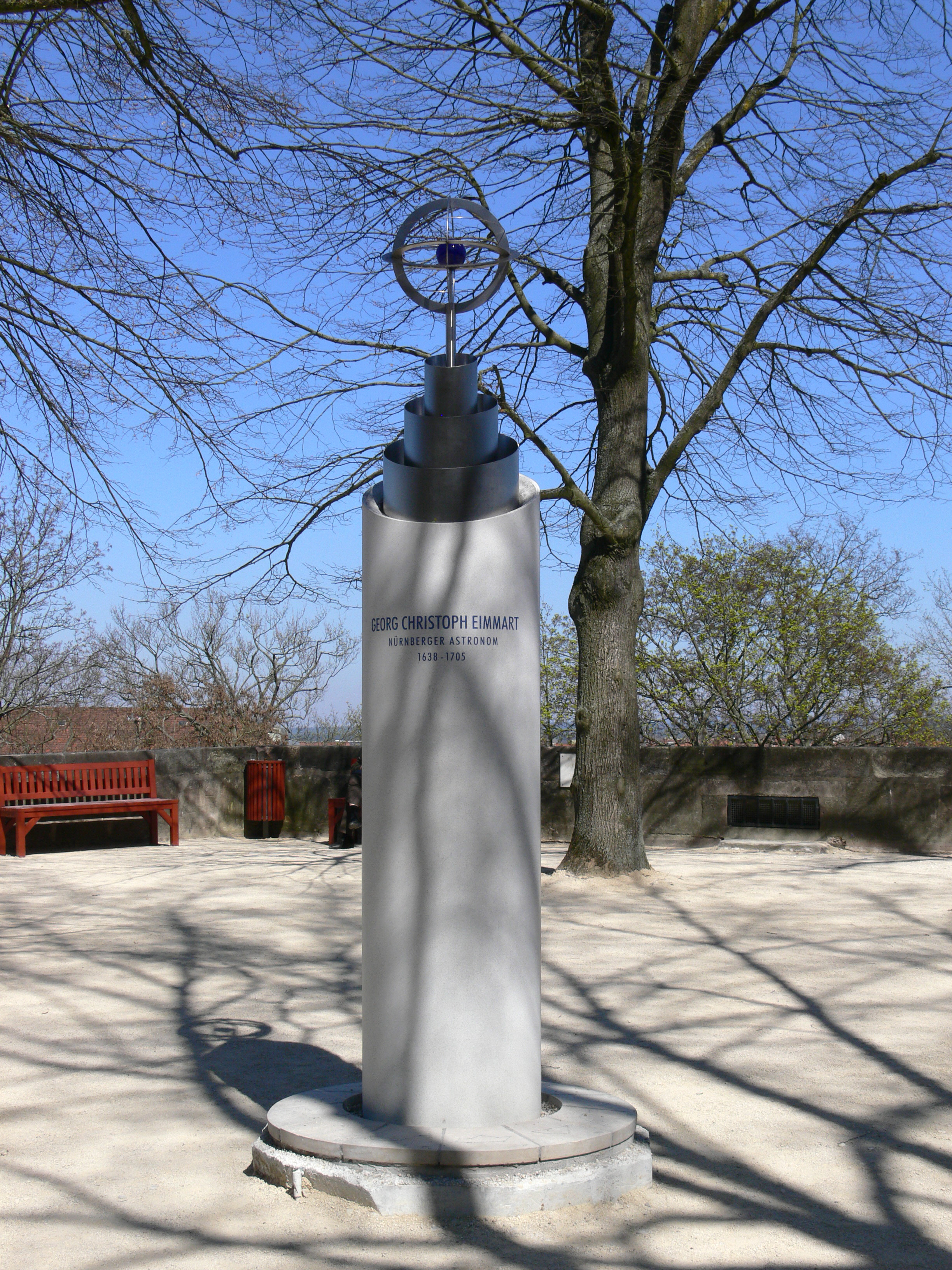 Nürnberg, Burgbasteien, Denkmal für Georg Christoph Eimmart auf der Vestnertorbastei